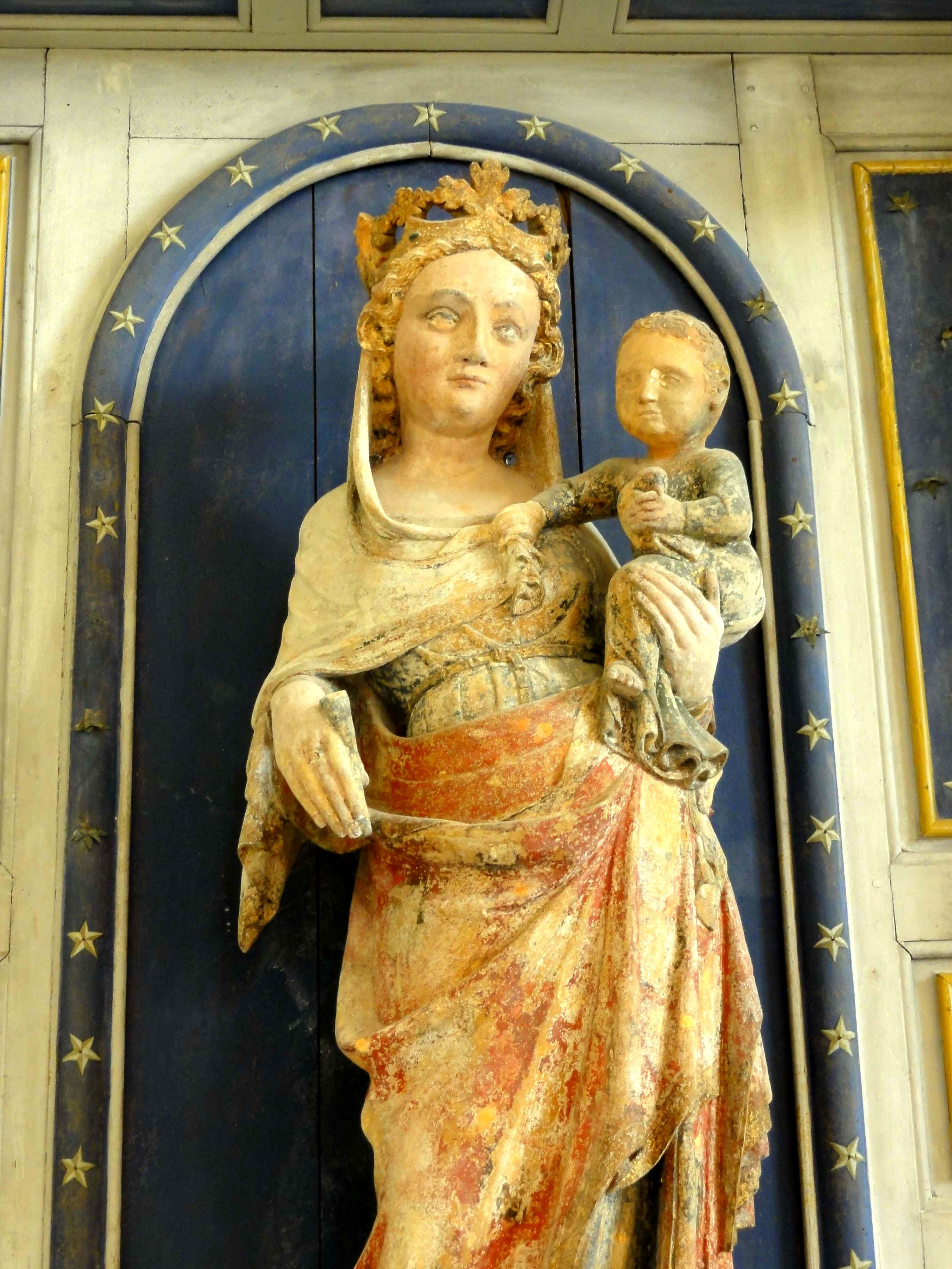 Mobilier de l'église (voir titre).